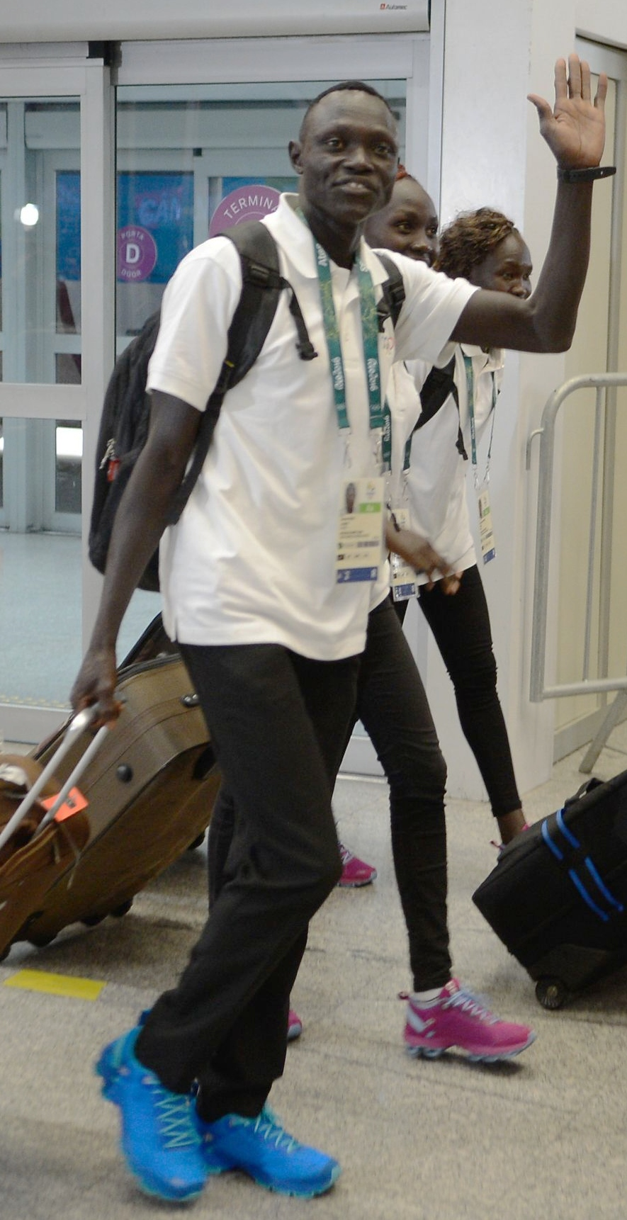 Rio de Janeiro - Integrantes da Equipe OlГ­mpica de Atletas Refugiados desembarcam no RioGaleГЈo. Os atletas sГЈo refugiados do SudГЈo do Sul que vivem no QuГЄnia e disputarГЈo diferentes modalidades de corrida nas competiГ§Гµes de atletismo (Foto: Tomaz Silva/AgГЄncia Brasil)